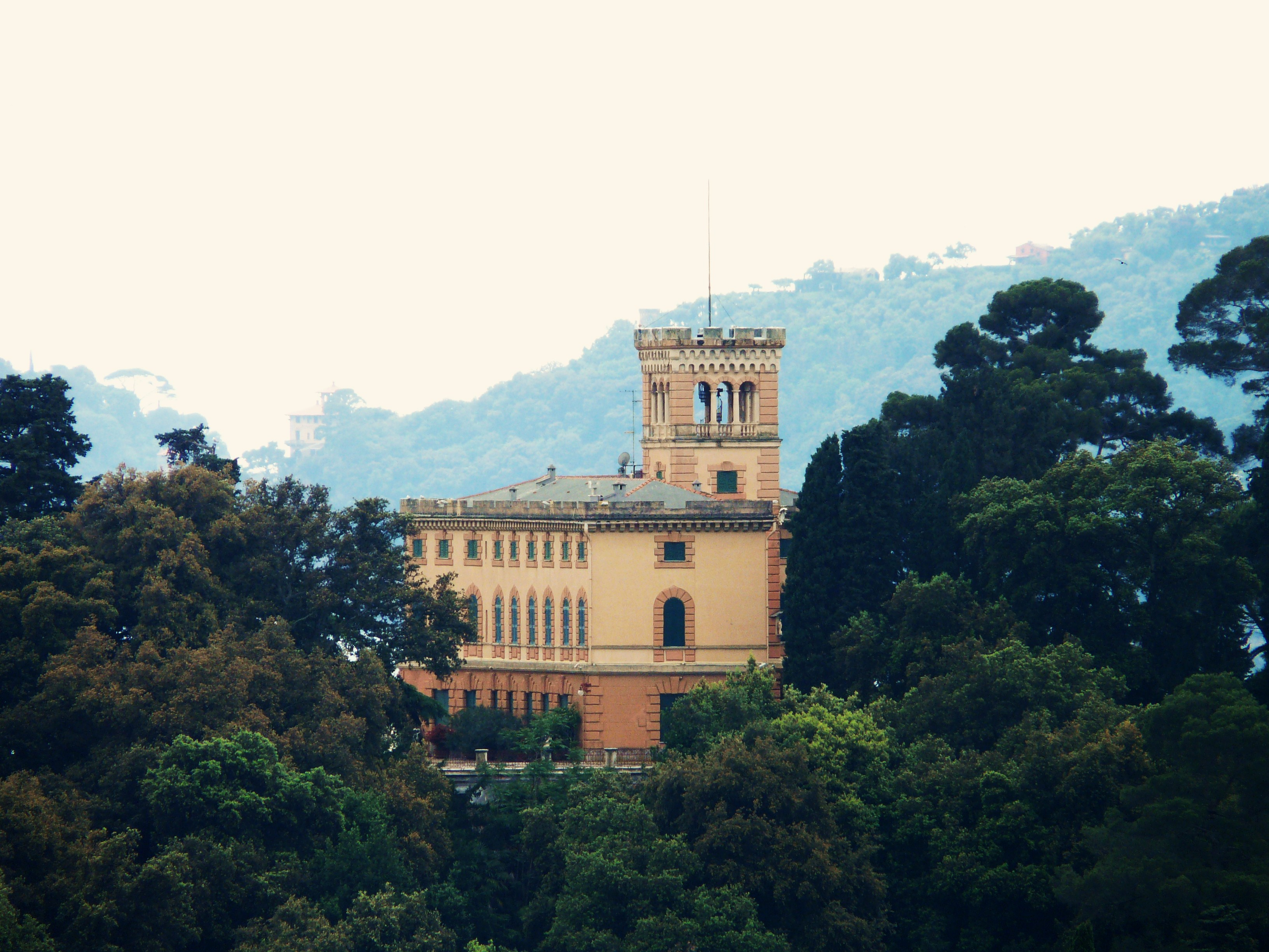 Villa dell'Ordine di Malta, San Michele di Pagana, Rapallo, Liguria, Italia